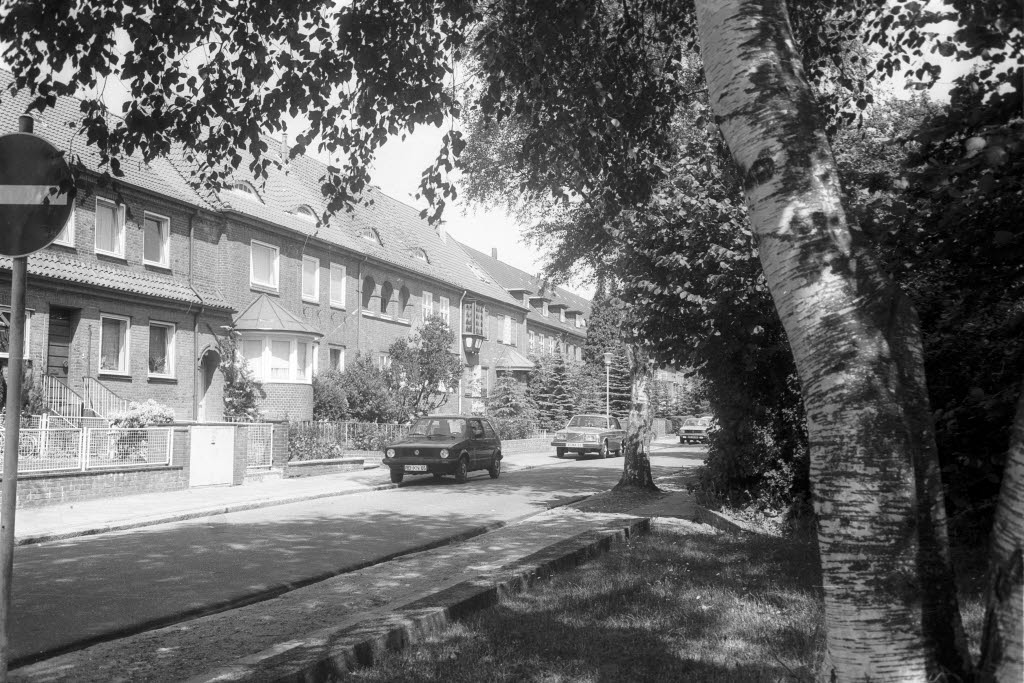 Wohnhäuser im Friedenskamp 1-11 in Kronshagen